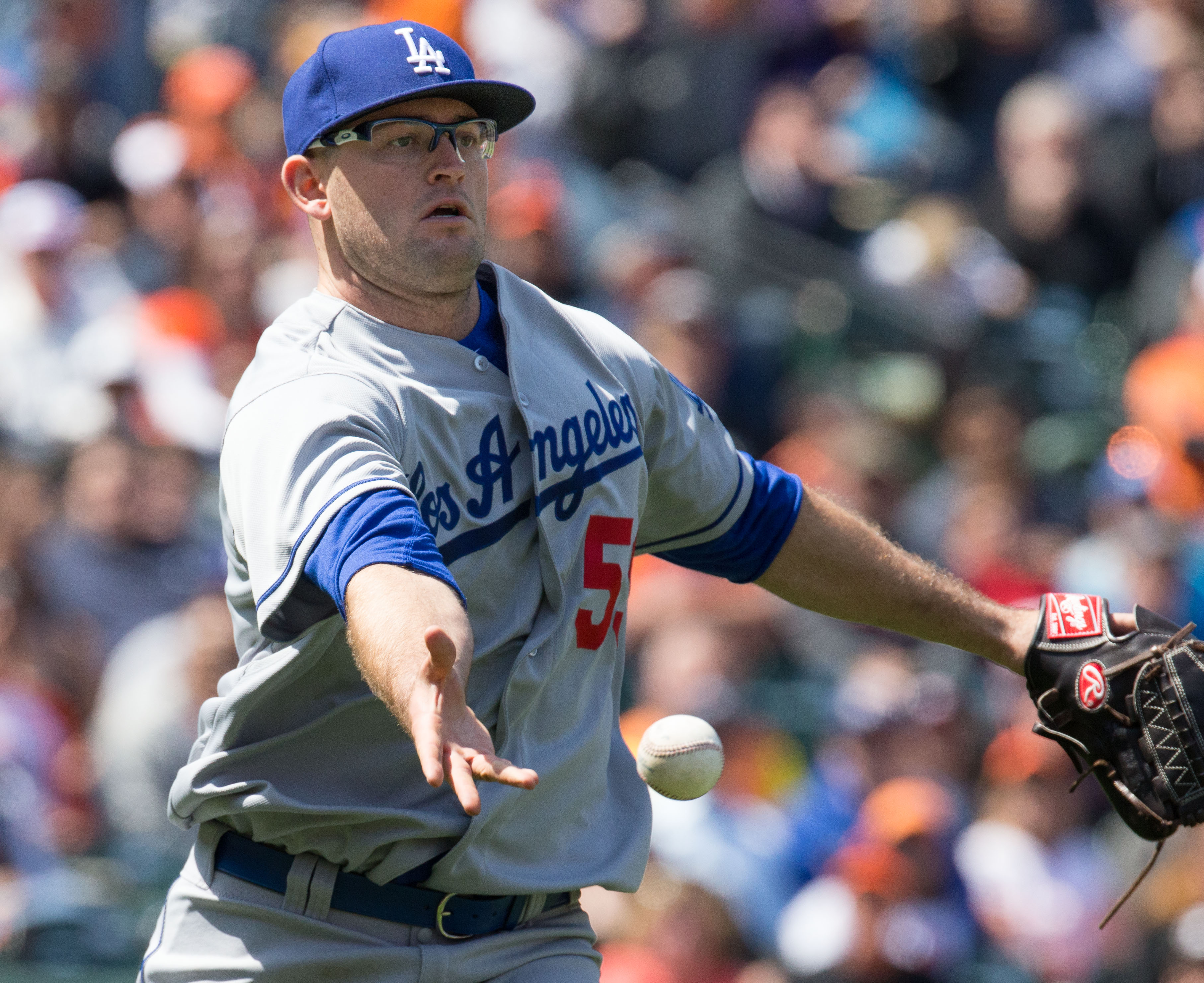 Stephen Fife